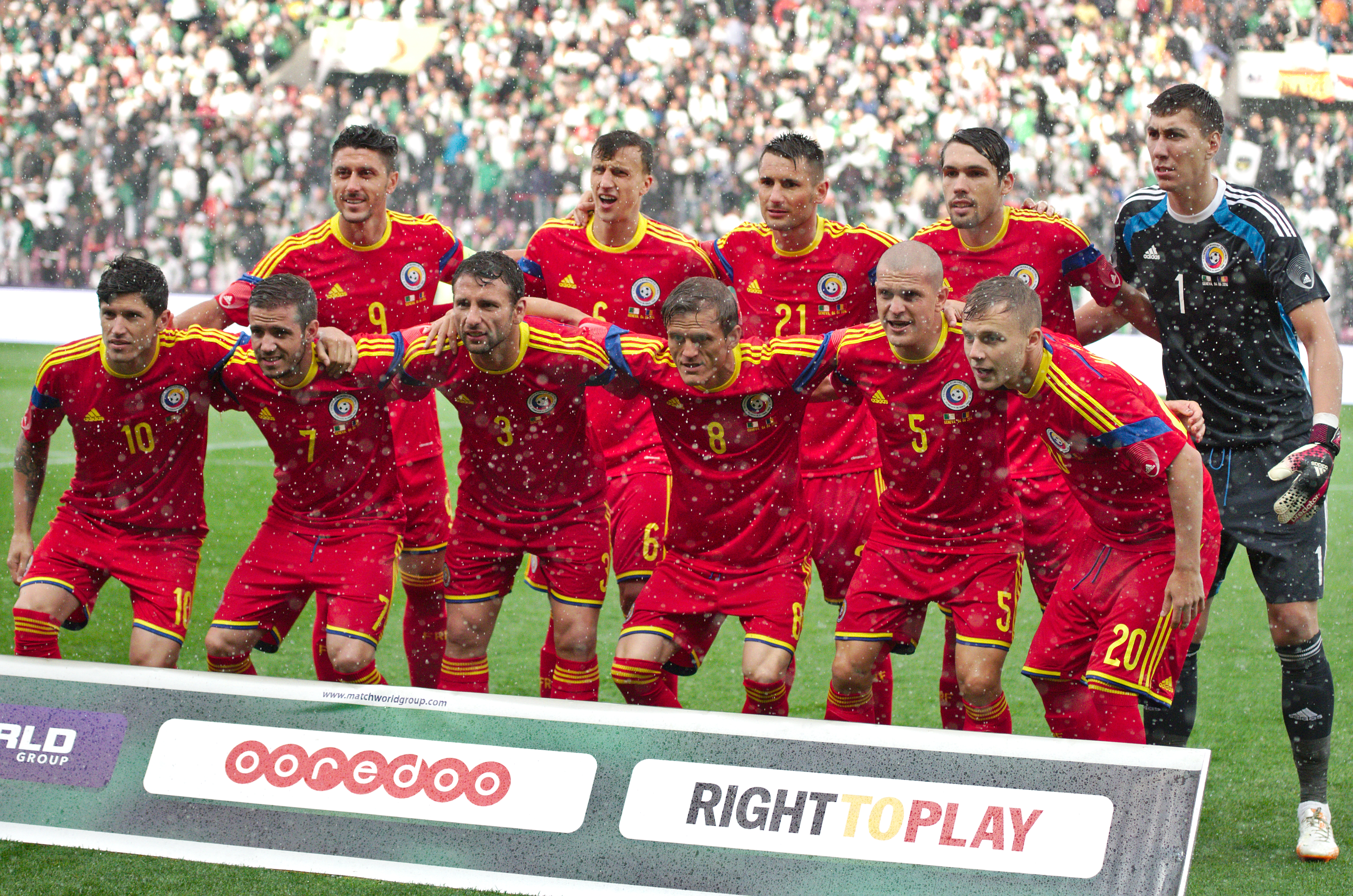 Algérie-Roumanie - 20140604 - Equipe de Roumanie